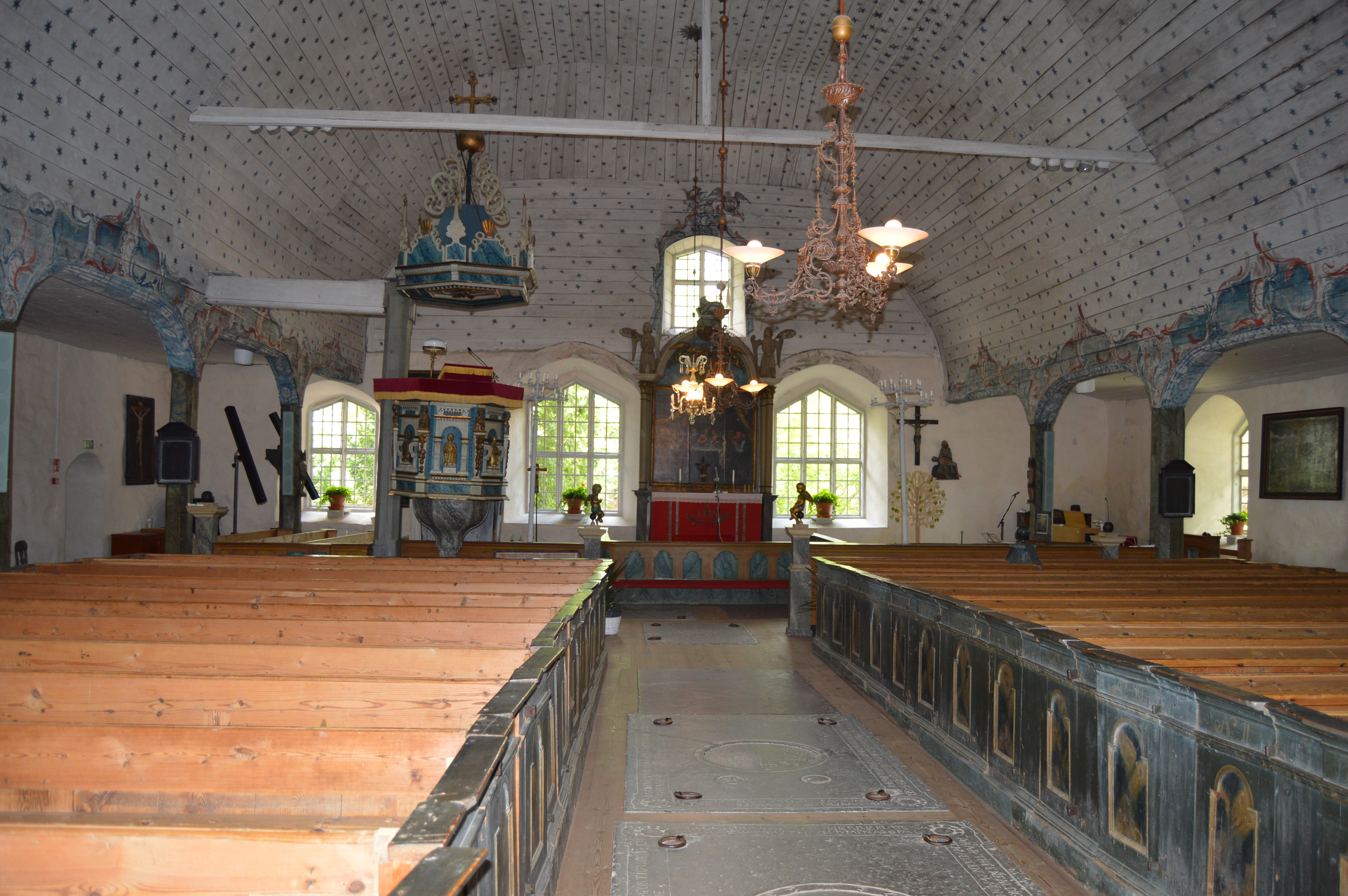 Uudenkaupungin vanha kirkko sisältä